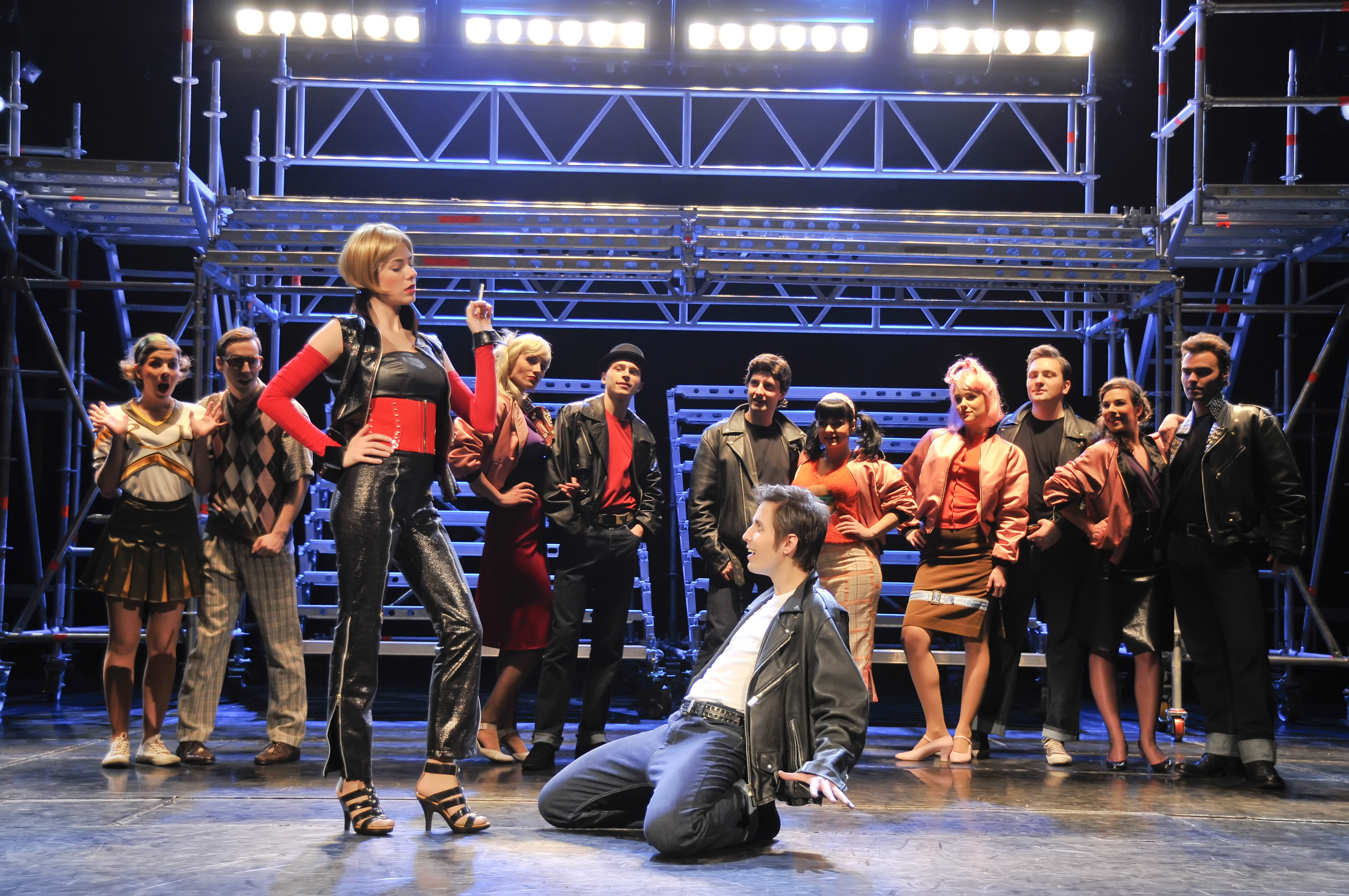 Premijera predstave "Briljantin"